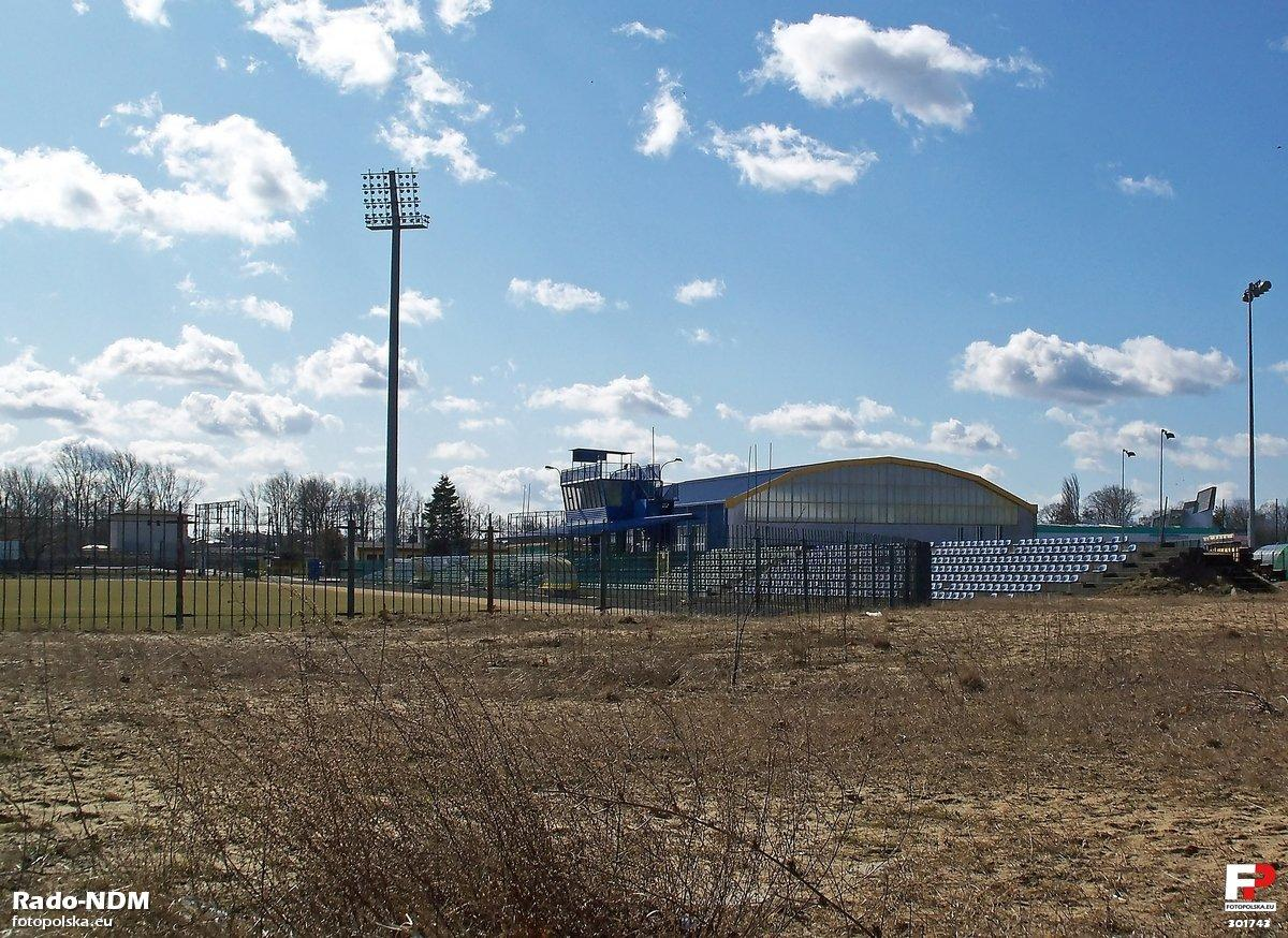 Zachodnia trybuna stadionu "Świtu" widziana od północy a za nią hala widowiskowo-sportowa Nowodworskiego Ośrodka Sportu i Rekreacji